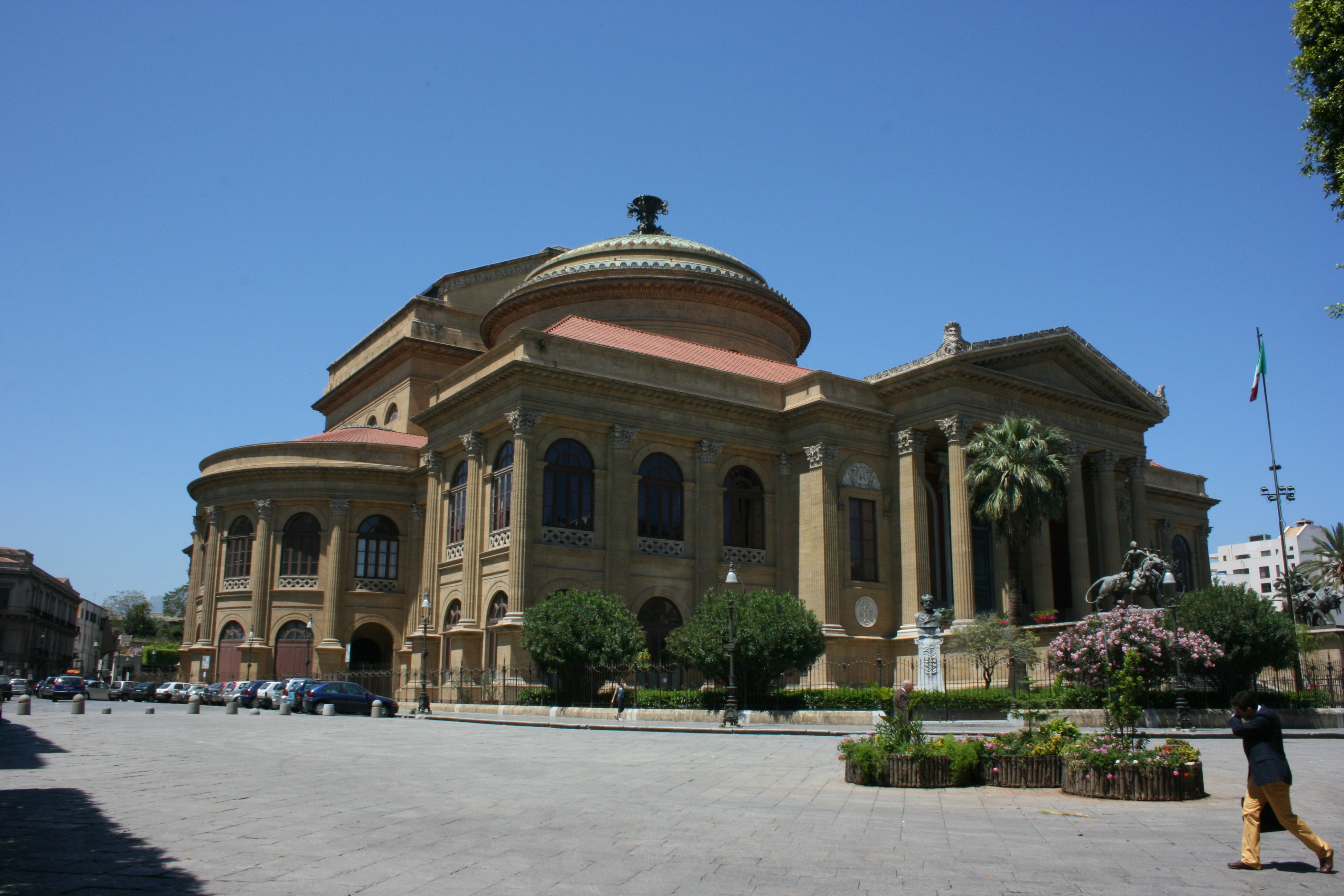 Theatro Massimo (Palermo)